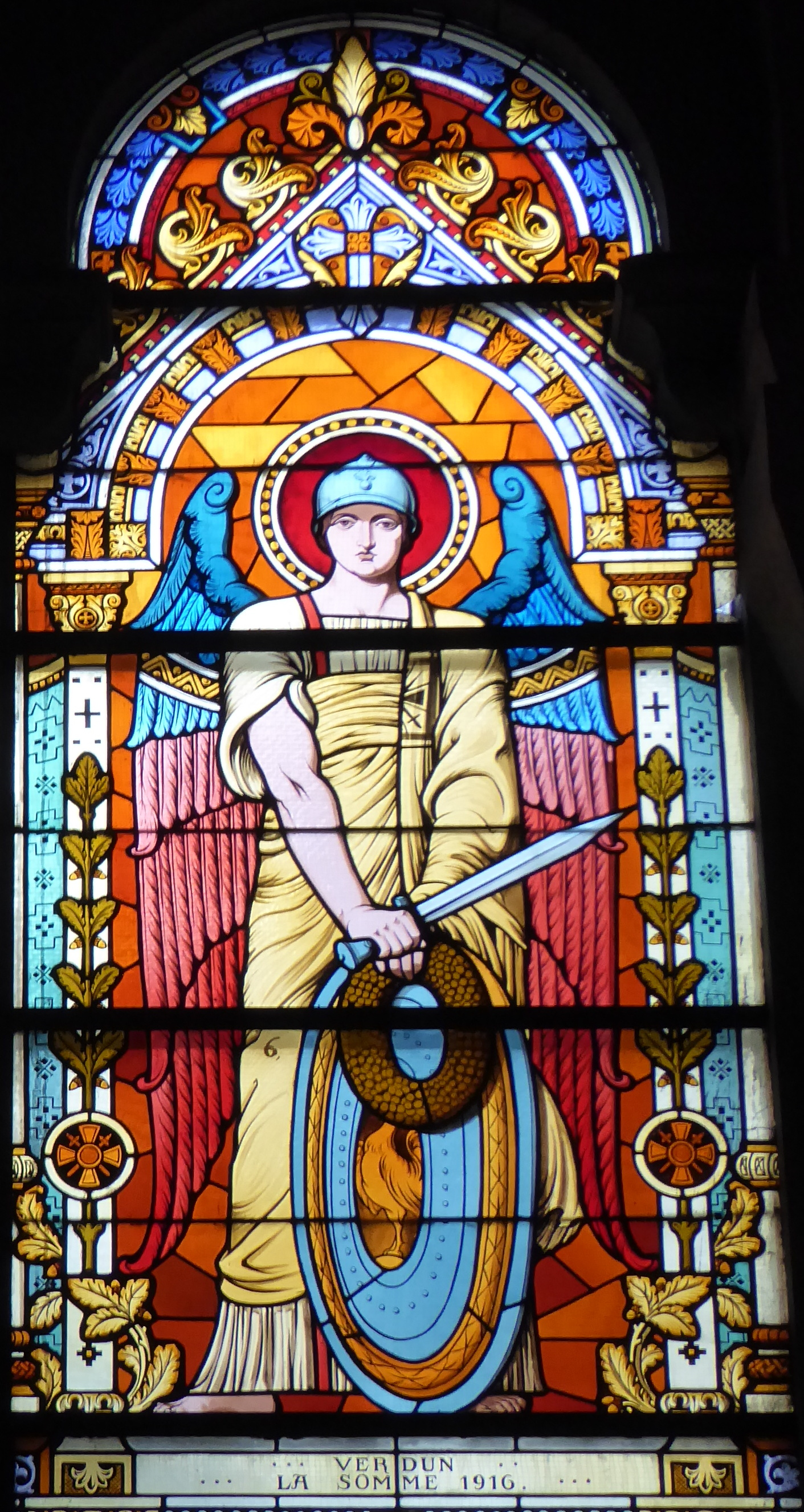 basilique du Sacré-Cœur (baie 1), Marseille, Bouches-du-Rhône (France). Inscription : Offensive de 1915 - Artois (mai juin) - Champagne (septembre) / Verdun - La Somme 1916